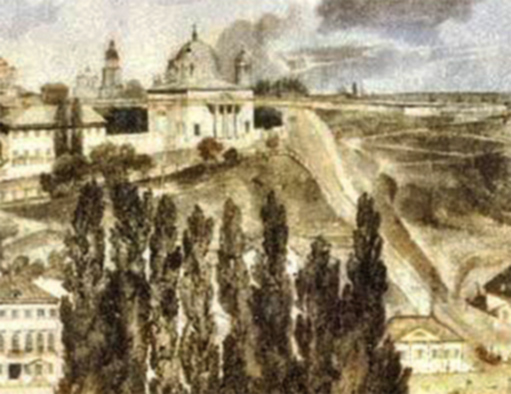 Фрагмент малюнка Грота. Олександрівський костел і ділянка Трьохсвятительської вулиці до Хрещатика (праворуч)